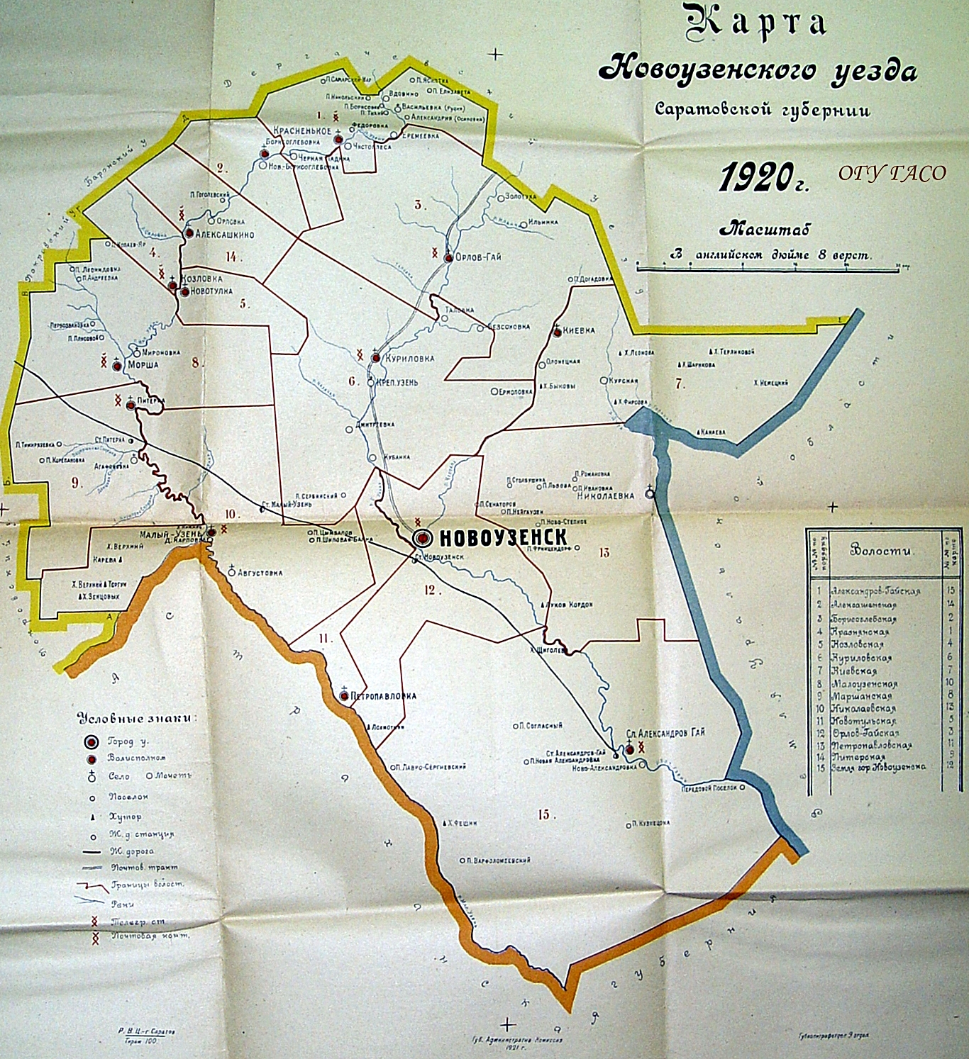 Карта Новоузенского уезда 1920 года